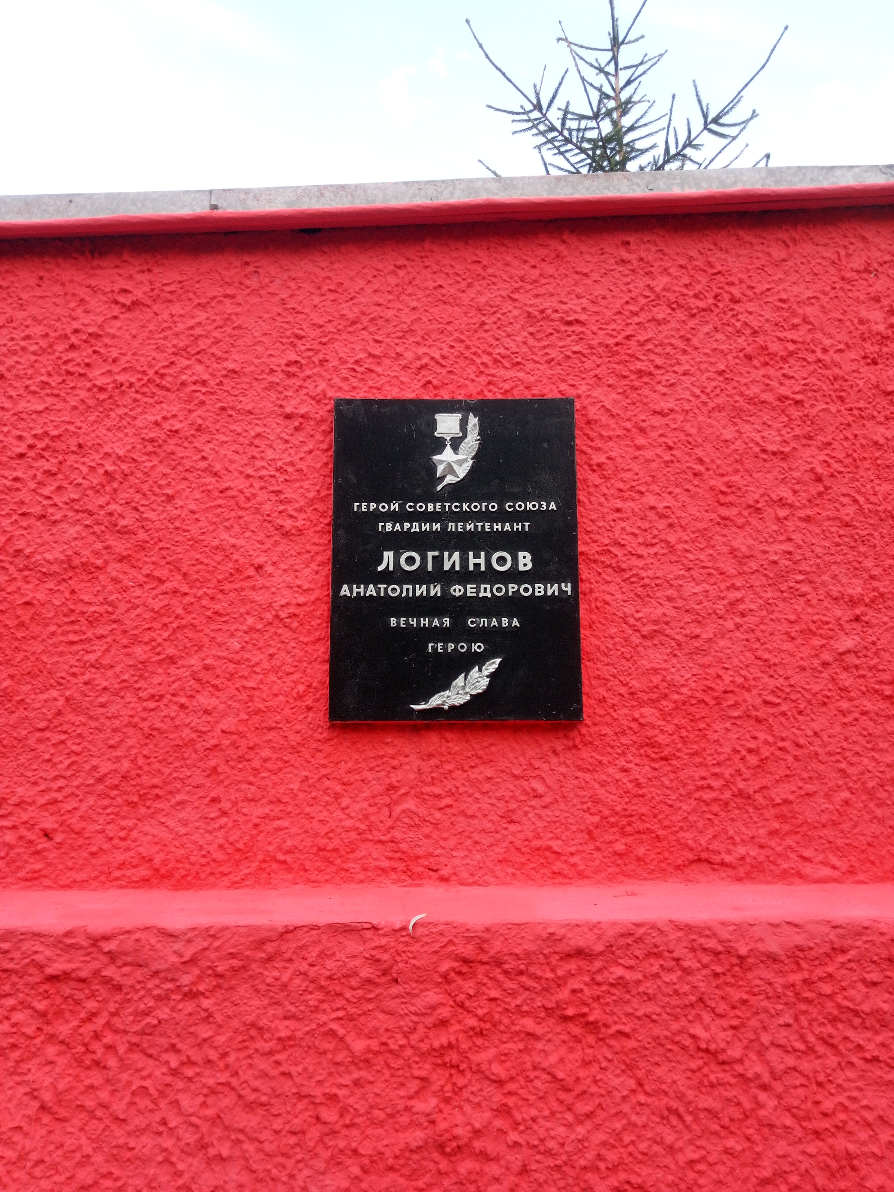 Мар’іна Горка. Мемарыял 8-ай танкавай дывізіі